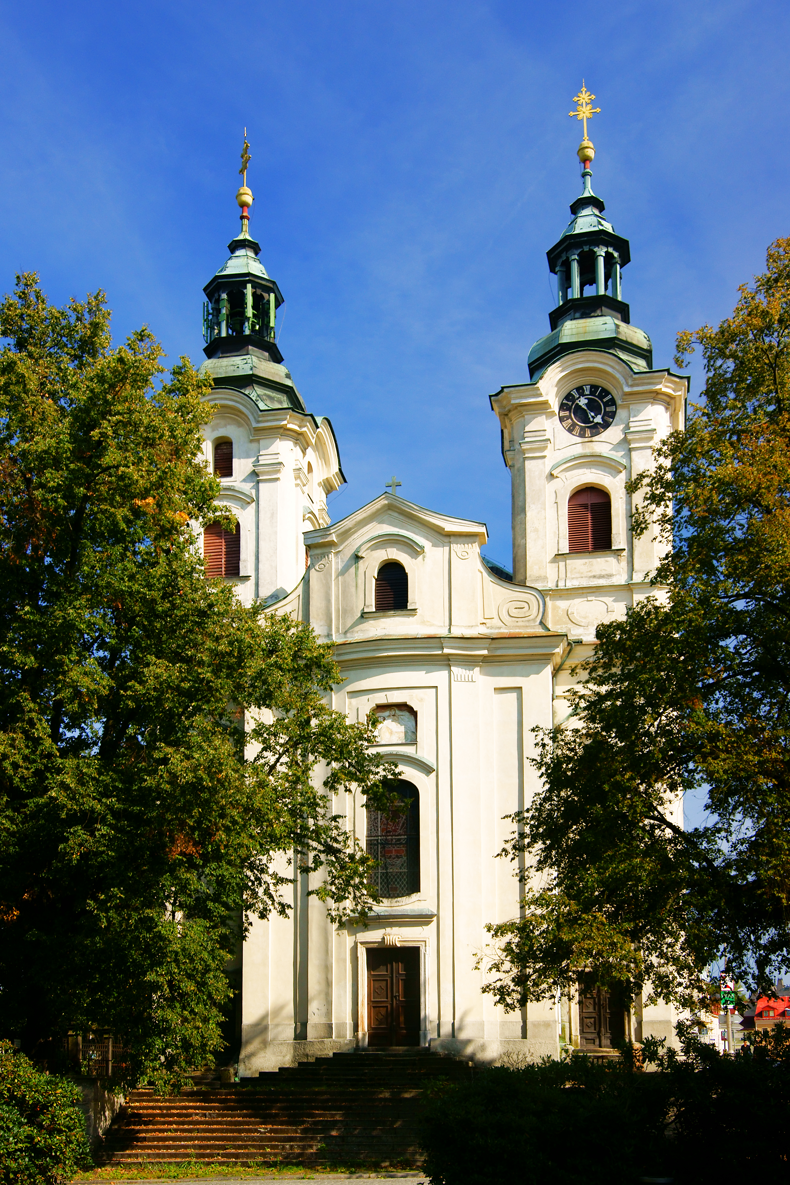 Barokní kostel Nalezení svatého Kříže v Liberci (tzv. Křížový kostel).